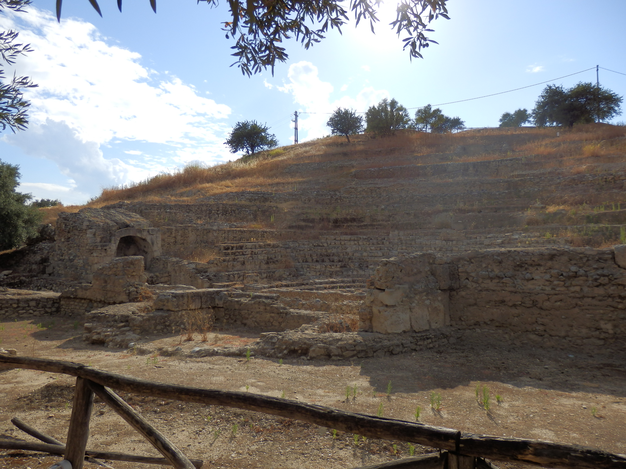 Vue du théâtre romain de Scolacium.